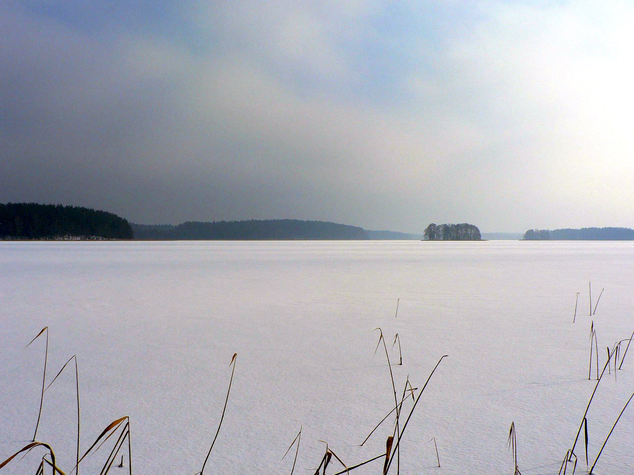 Zdróżno lake in Mazury Author: Wojsyl, 2006